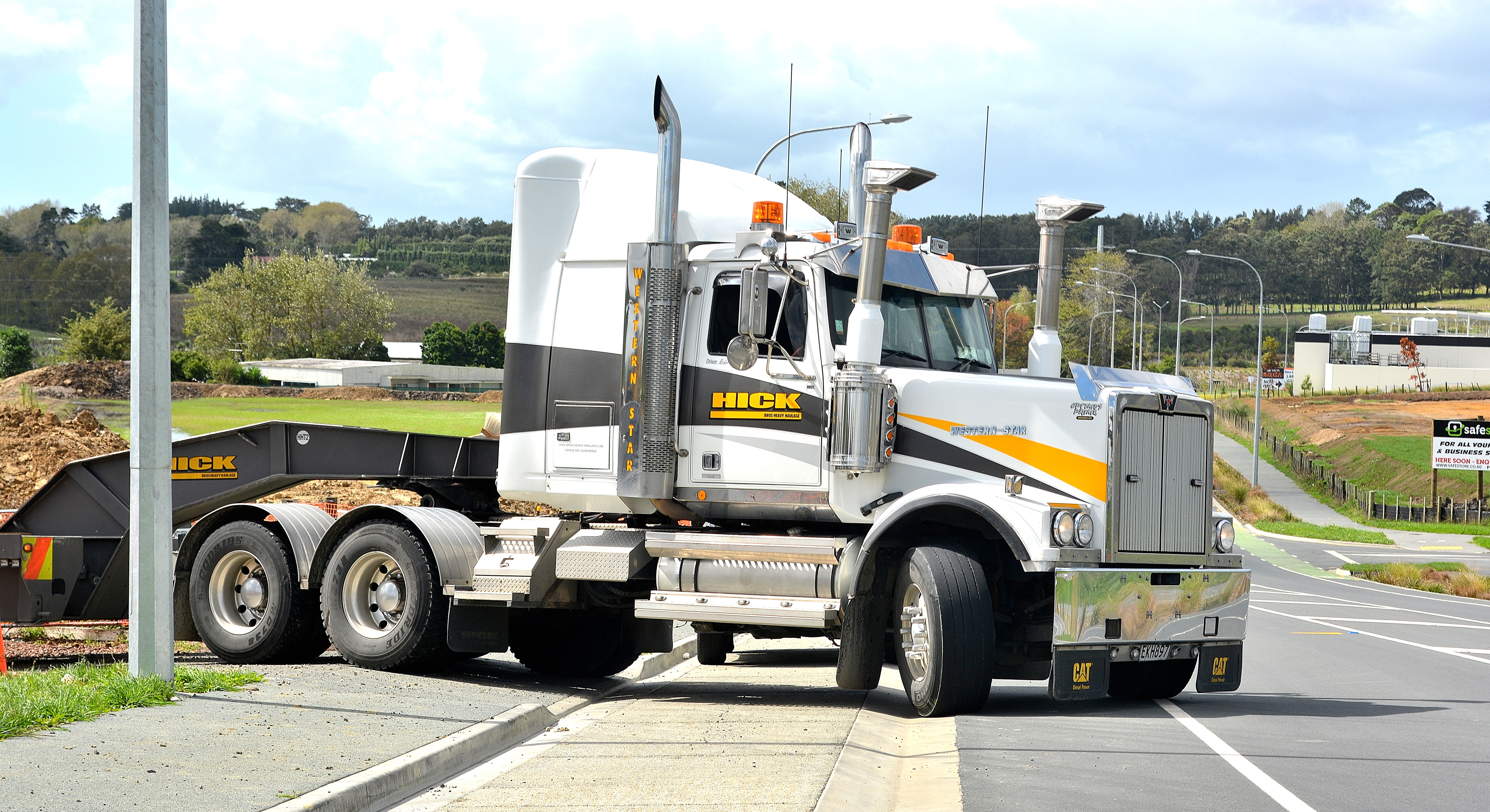 Westgate,West Auckland.New Zealand